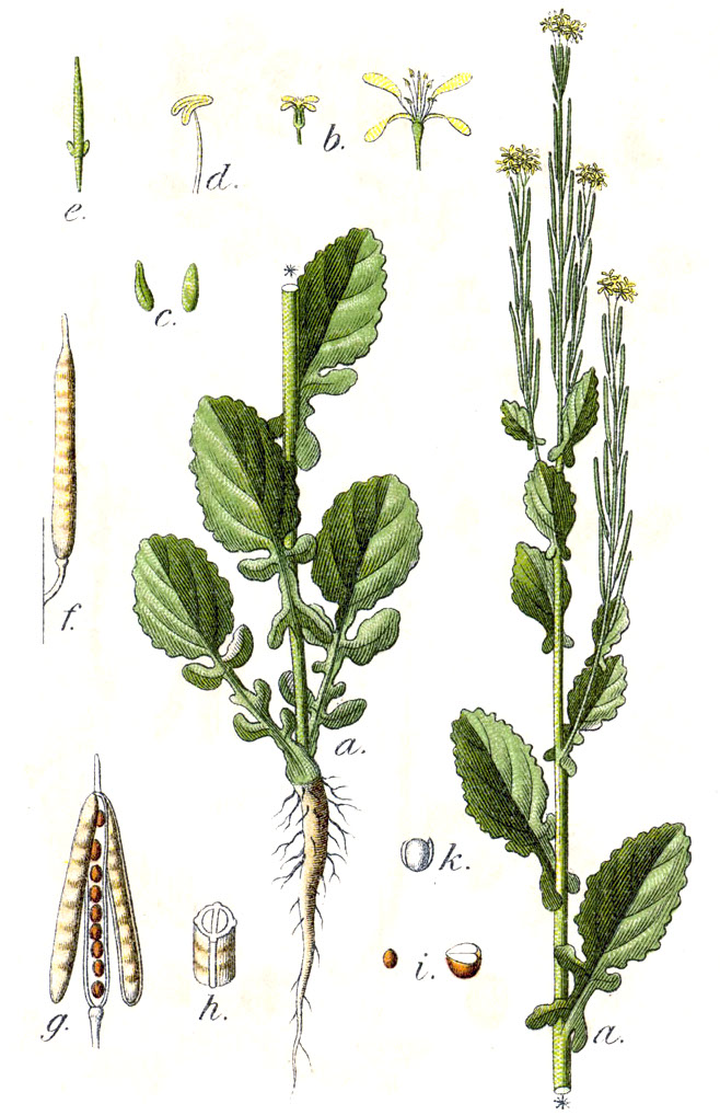 Barbarea stricta Andrz. ex Besser., syn. Crucifera stricta E.H.L.Krause Original Caption Steifes Barbarakraut, Crucifera stricta